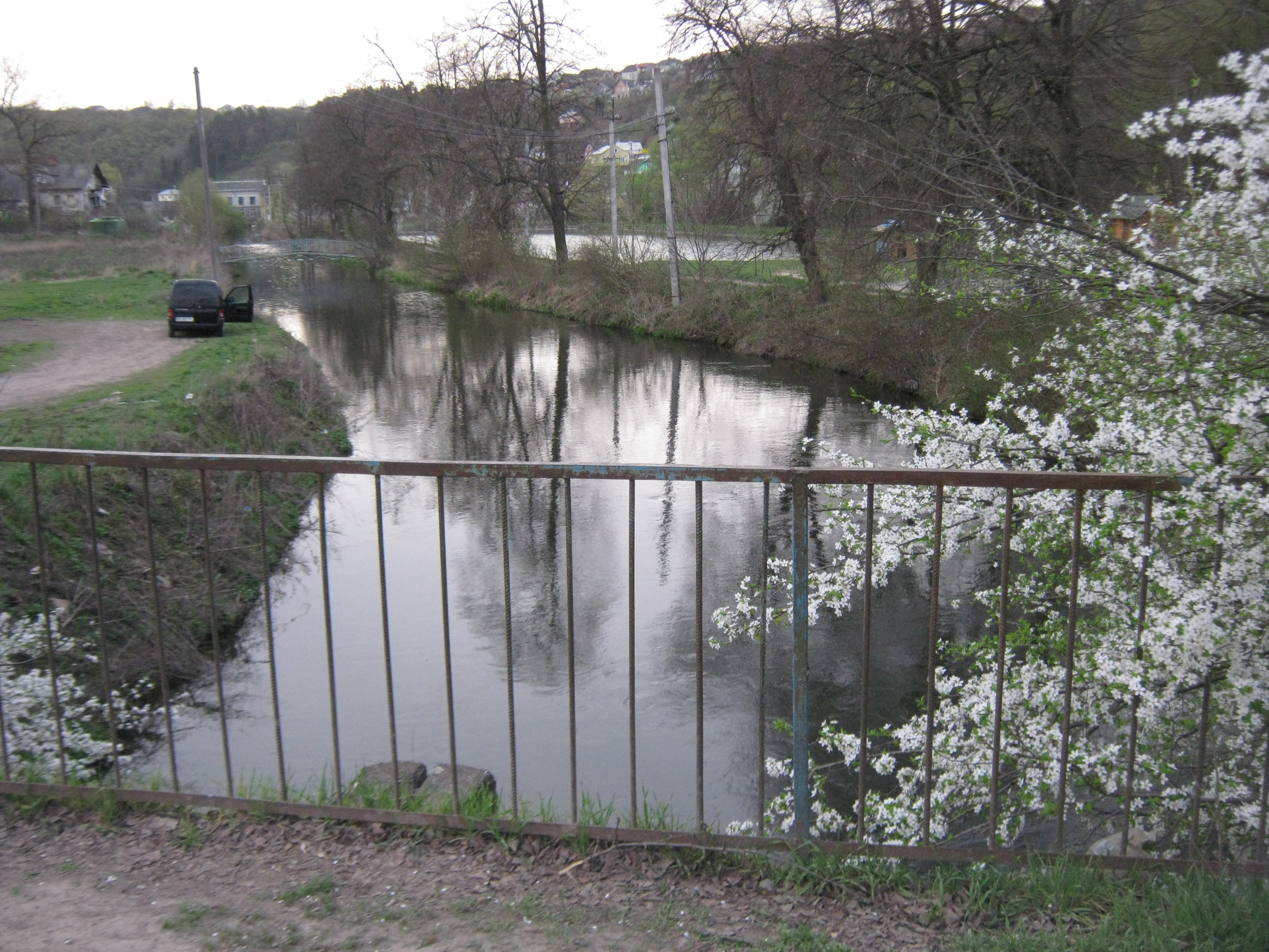 канал ГЕС, Бучач